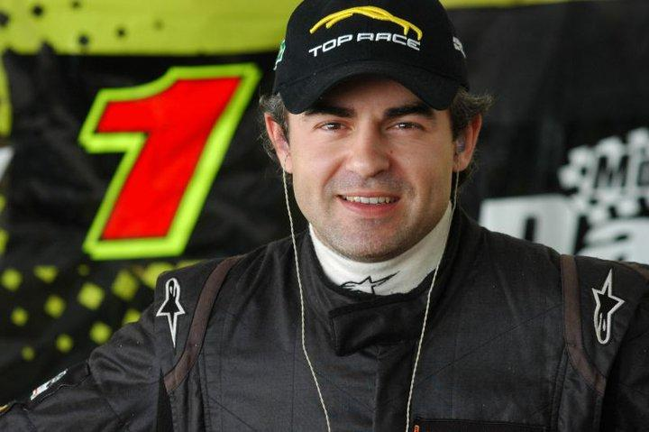 Fotografía del piloto Humberto Krujoski, campeón 2010 de Top Race Junior